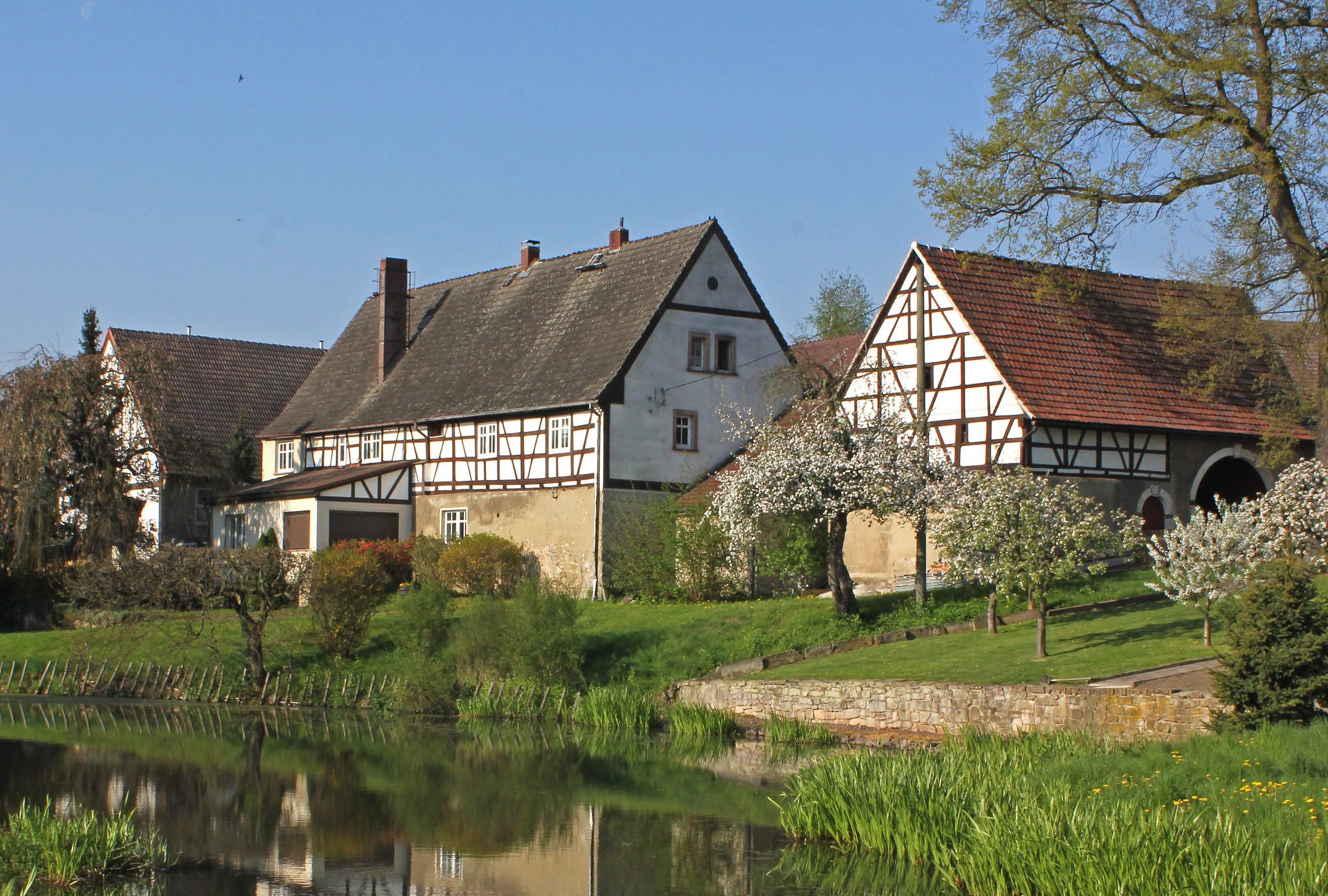 Typischer ortsbildprägender Vierseithof mit Torhaus von 1743 in weithin sichtbarer Lage am Teich in Plottendorf (Altenburger Land). Kulturdenkmal gemäss § 5 Abs. 1 Satz 3, 2. Halbsatz ThürDSchG (Thüringer Denkmalschutzgesetz).